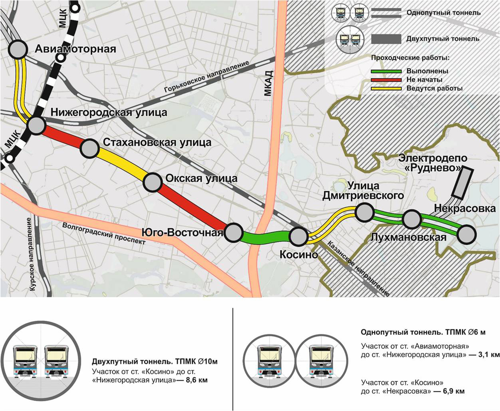 Ход работ. Февраль 2018 года